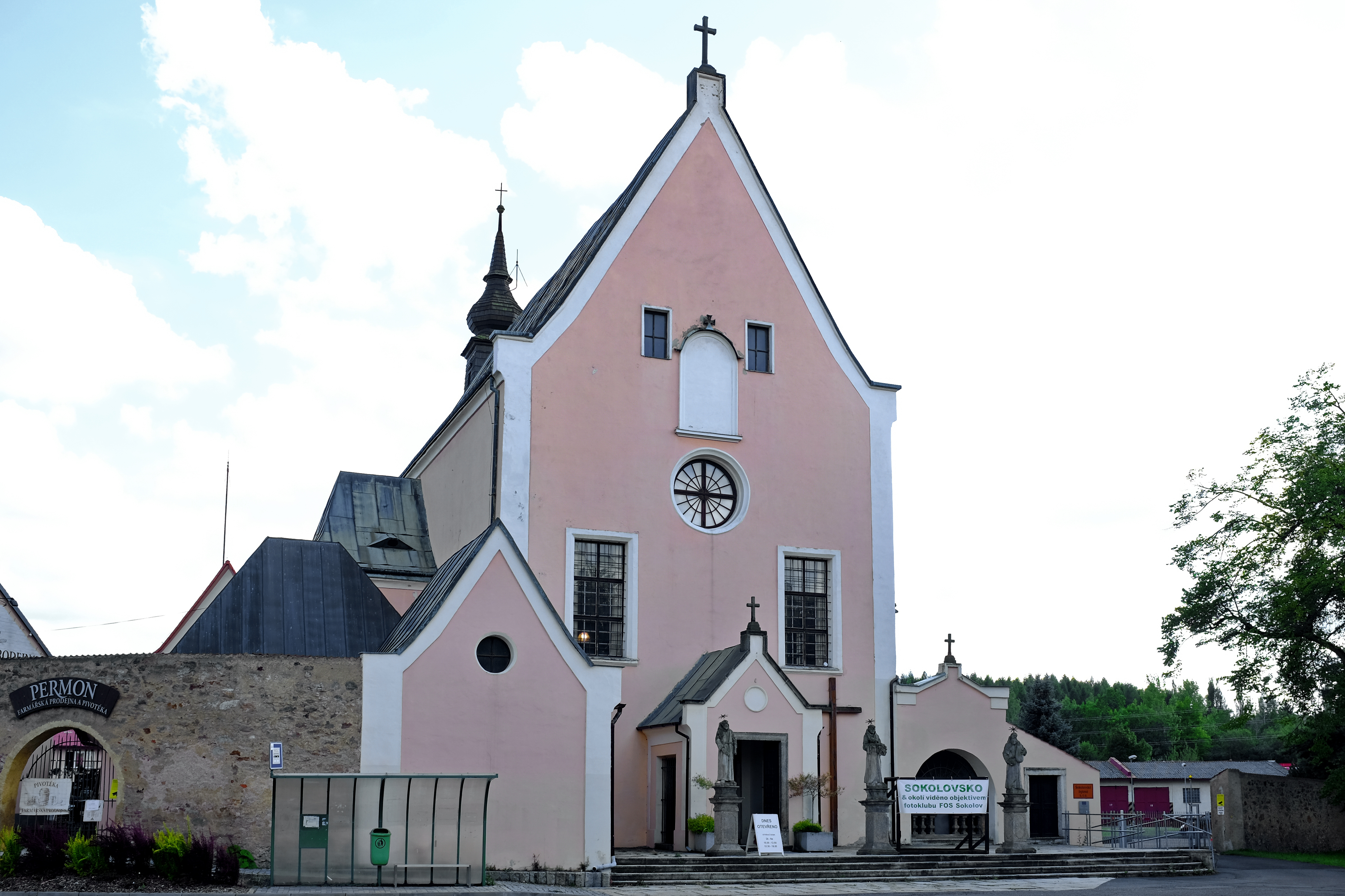 Kapucínský klášter, Komenského 77, Sokolov.